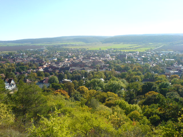 Frankenhausen von oben andere Versionen